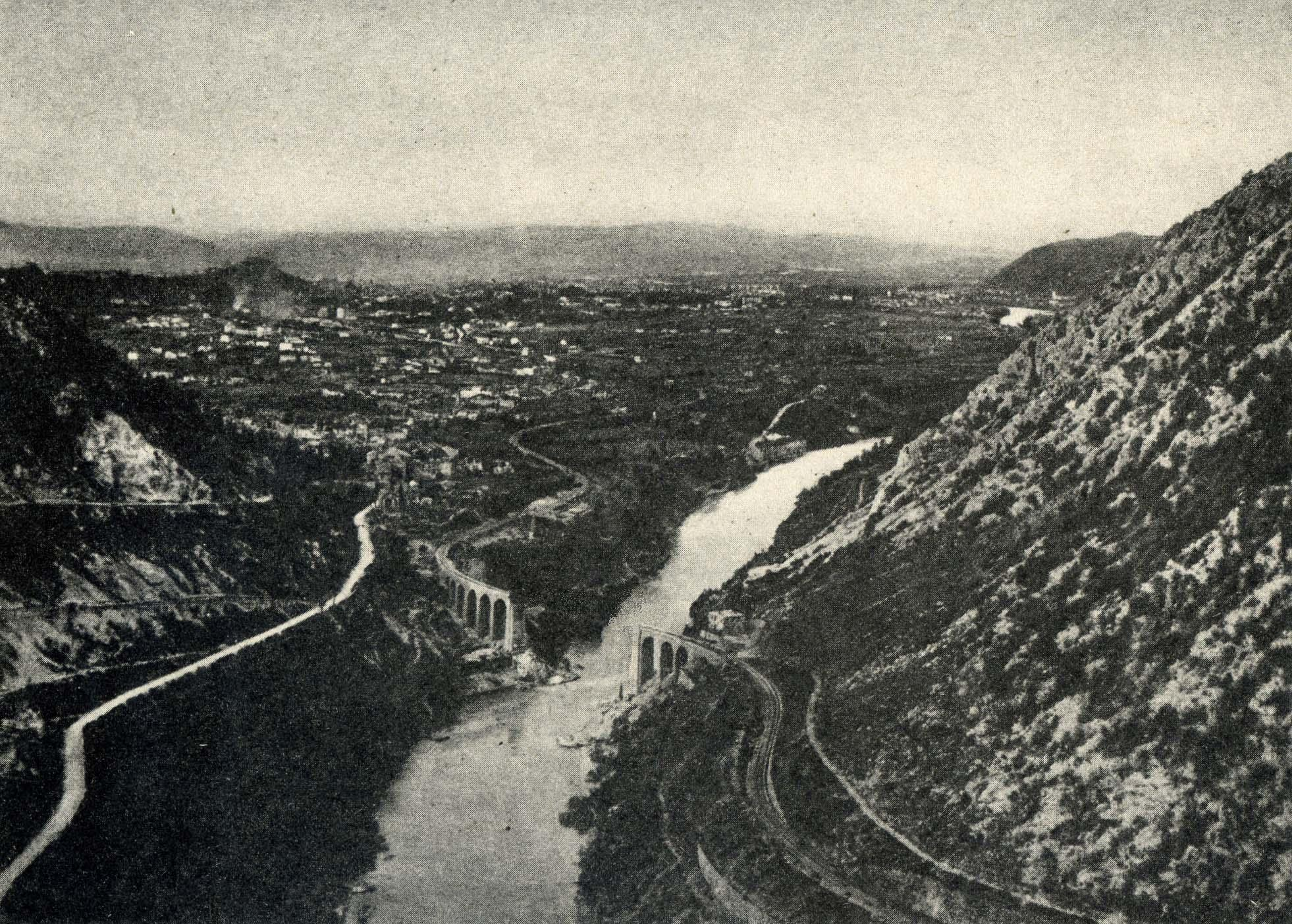 Der Isonzo bei Görz mit der gesprengten Eisenbahnbrücke